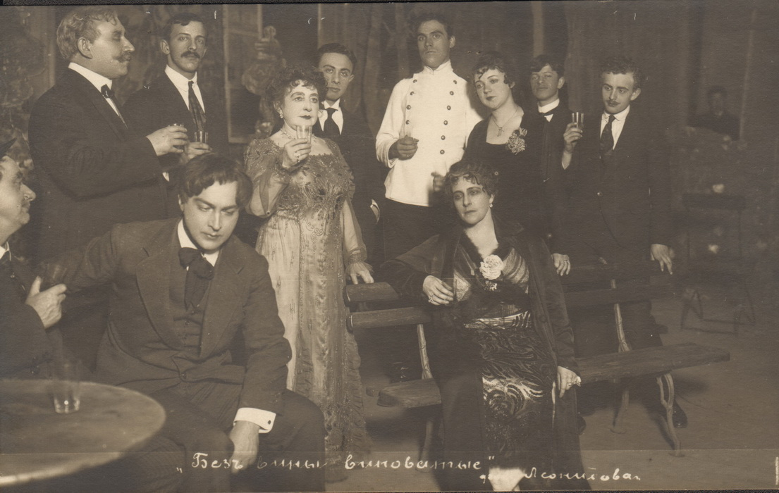 Малый театр "Без вины виноватые"; А. Н. Островский; А. А. Яблочкина - Коринкина, М. Н. Ермолова - Кручинина, А. А. Остужев - Незнамов, И. А. Рыжов - Муров; фотограф Леонидов; 1917